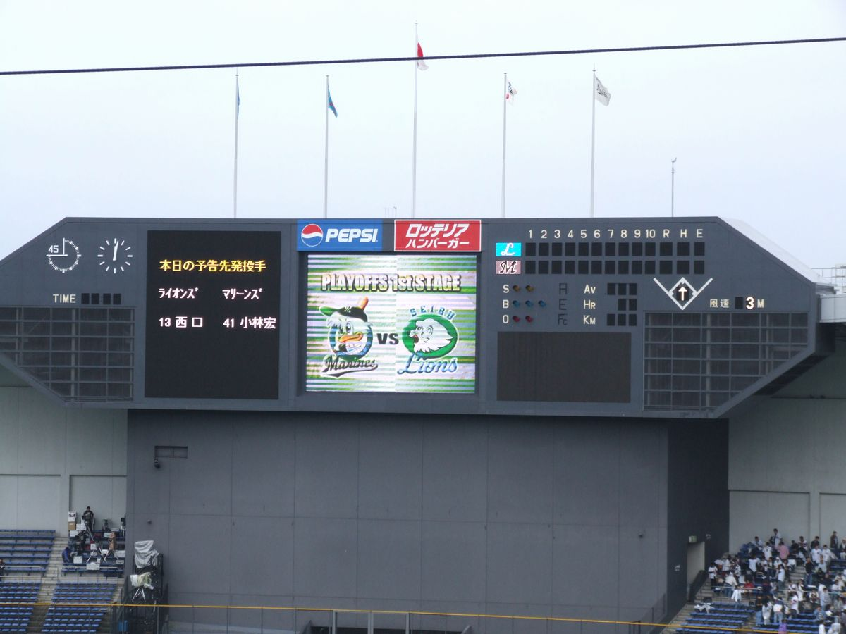 利用者:ROGによる撮影（2005年10月9日撮影） 2006年9月9日 (土) 17:56 . . ROG . . 1200×900 (102 キロバイト)